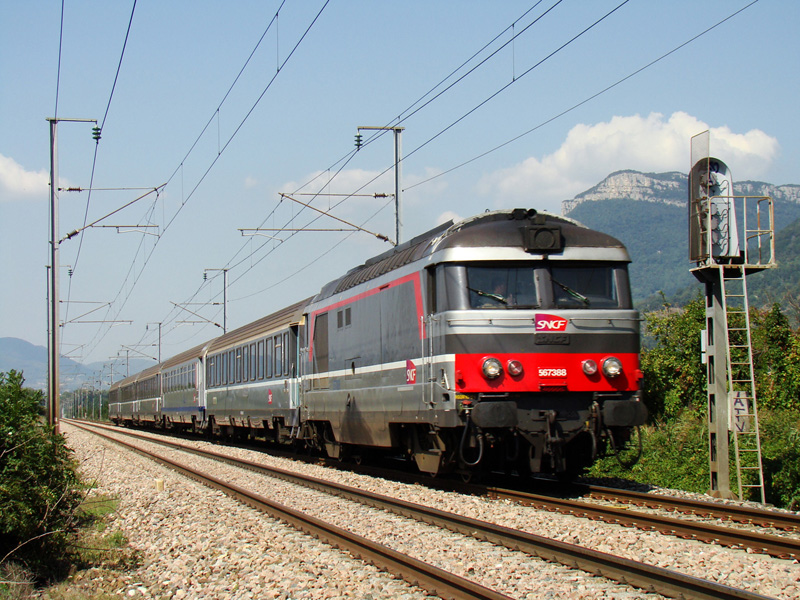 la BB.67388 file vers Grenoble sur un TER Valence - Annecy